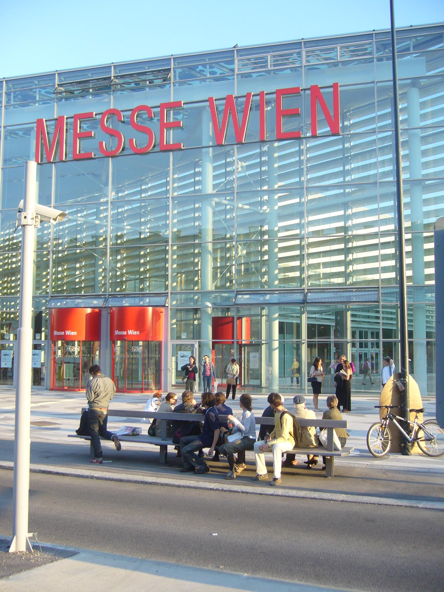 Messe Wien, a kortárs művészek híres Viennafair aukciós vására (Bécs, Ausztria)